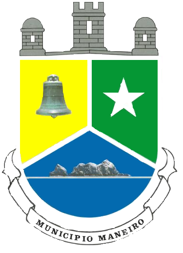 Escudo del municipio Maneiro. Isla de Margarita. Estado Nueva Esparta. Venezuela